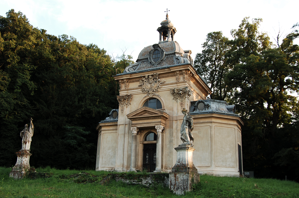 Mausoleum der Familie Althan nahe der Goldburg in Murstetten, NÖ